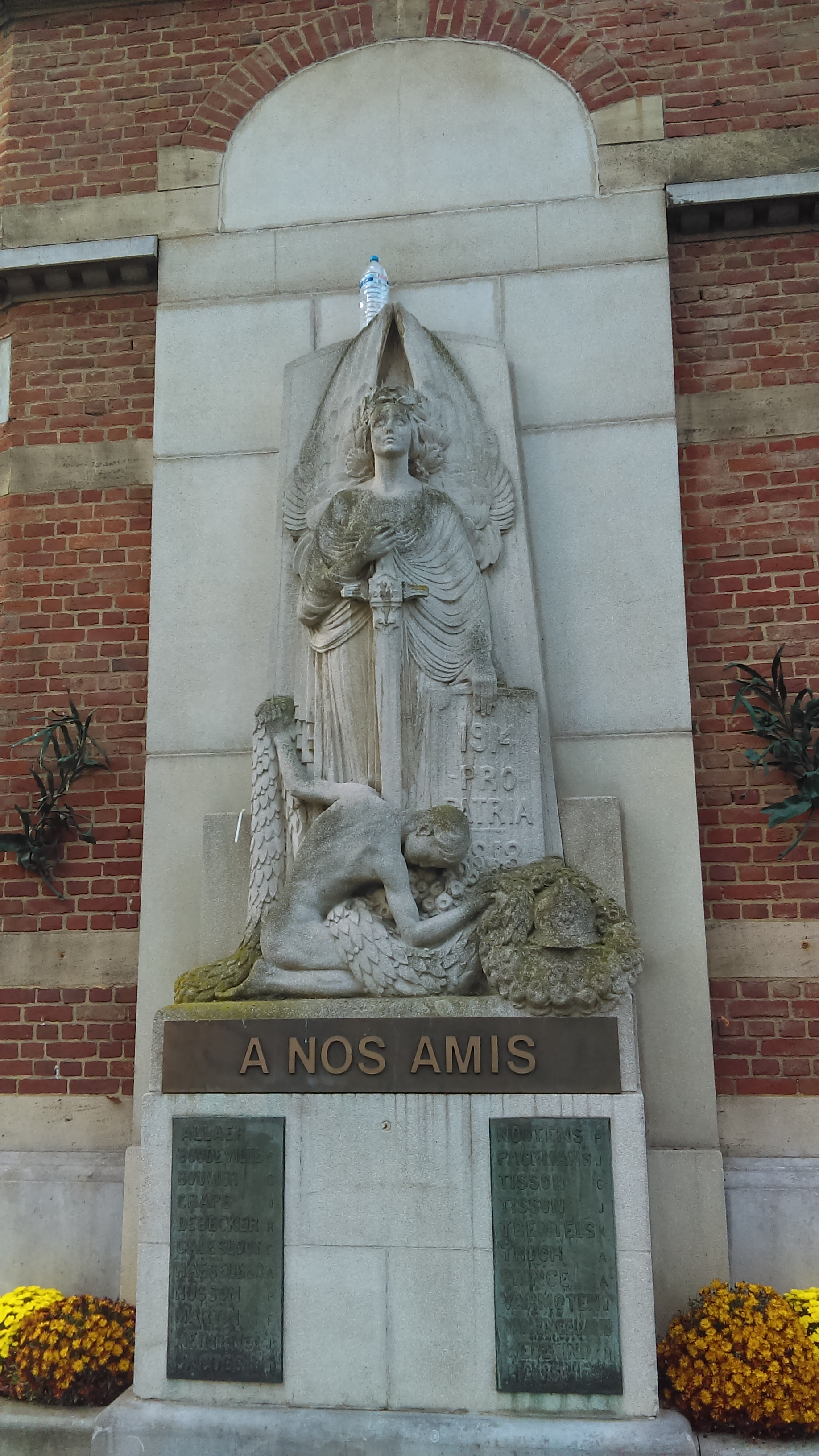 Etterbeek, rue van Gele, monument 1914-1918